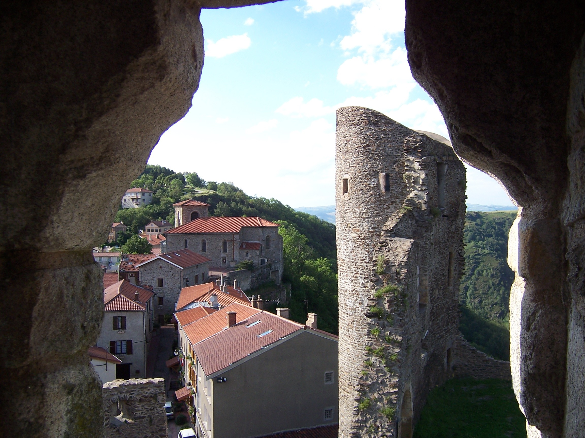 Vue de l'église depuis le château de Rochetaillée